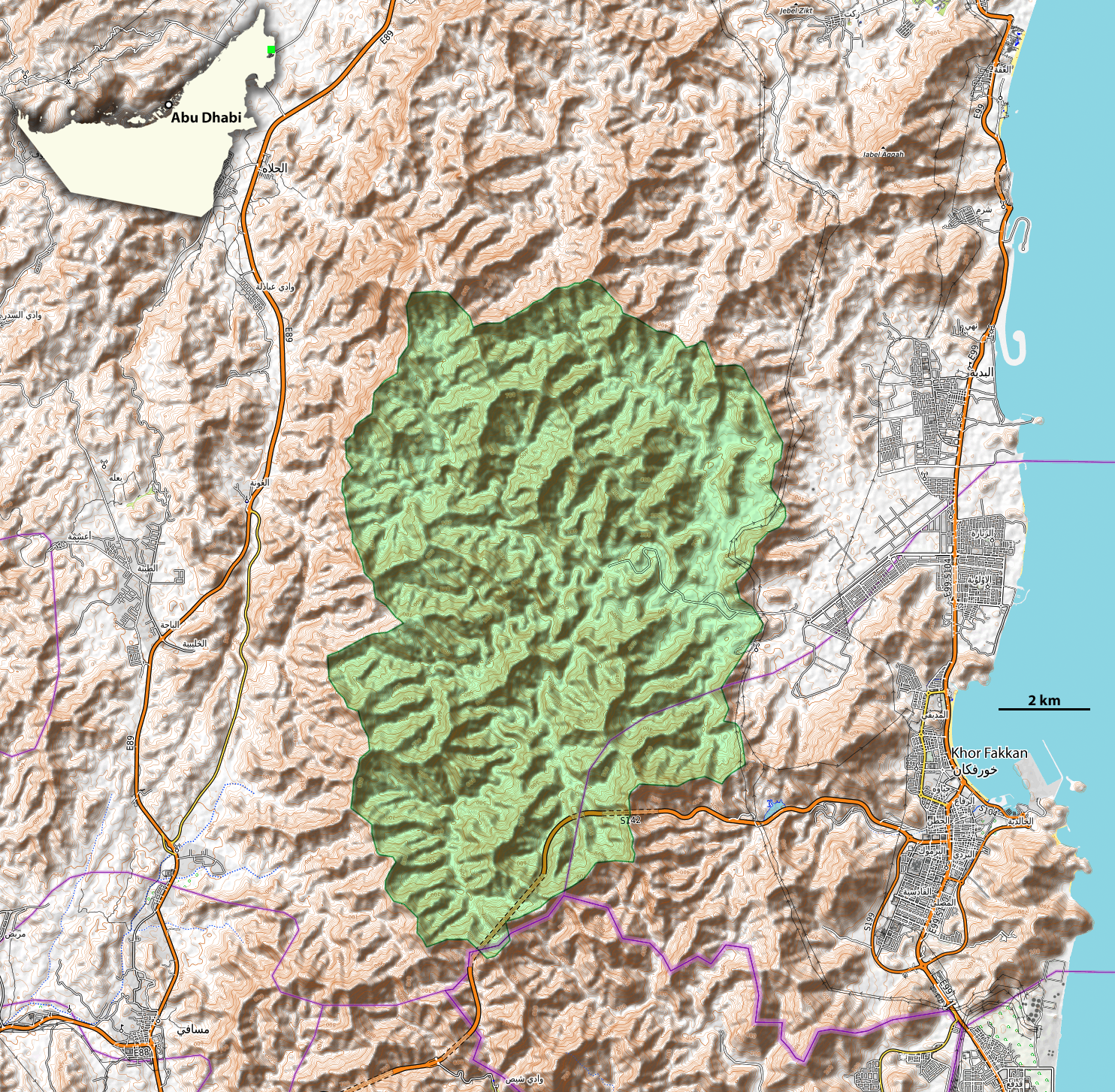 Wadi-Wuraya-Schutzgebiet in Nord-Fudschaira, Vereinigte Arabische Emirate